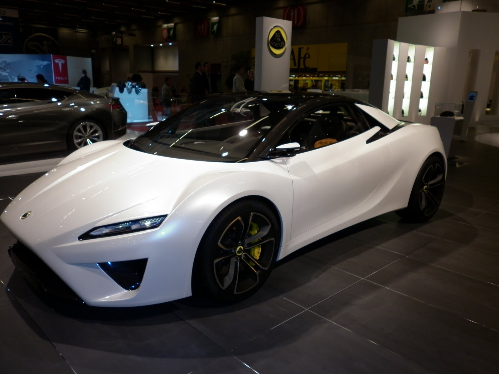 Stand Lotus Mondial de Paris